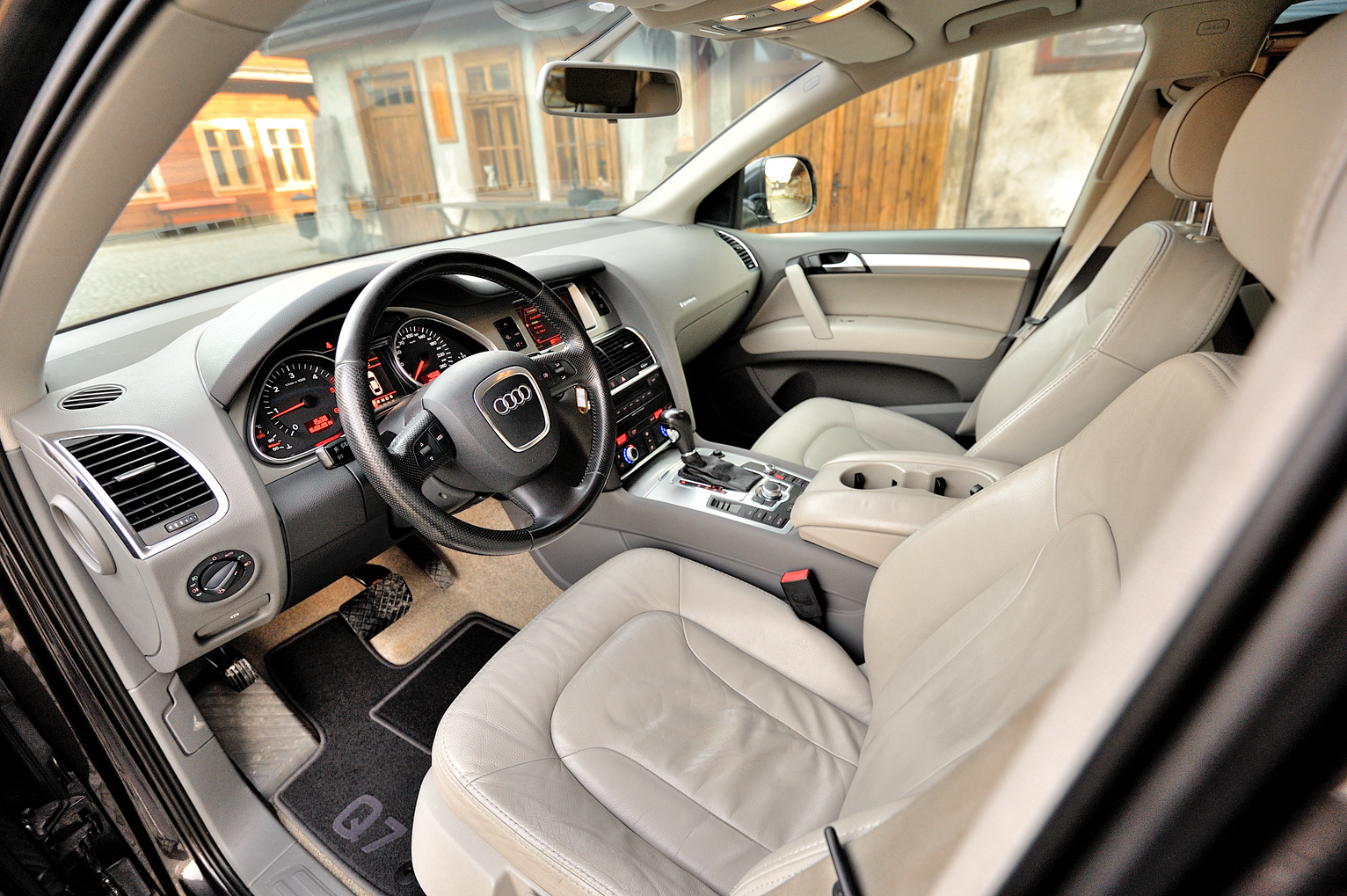 Audi Q7 interior